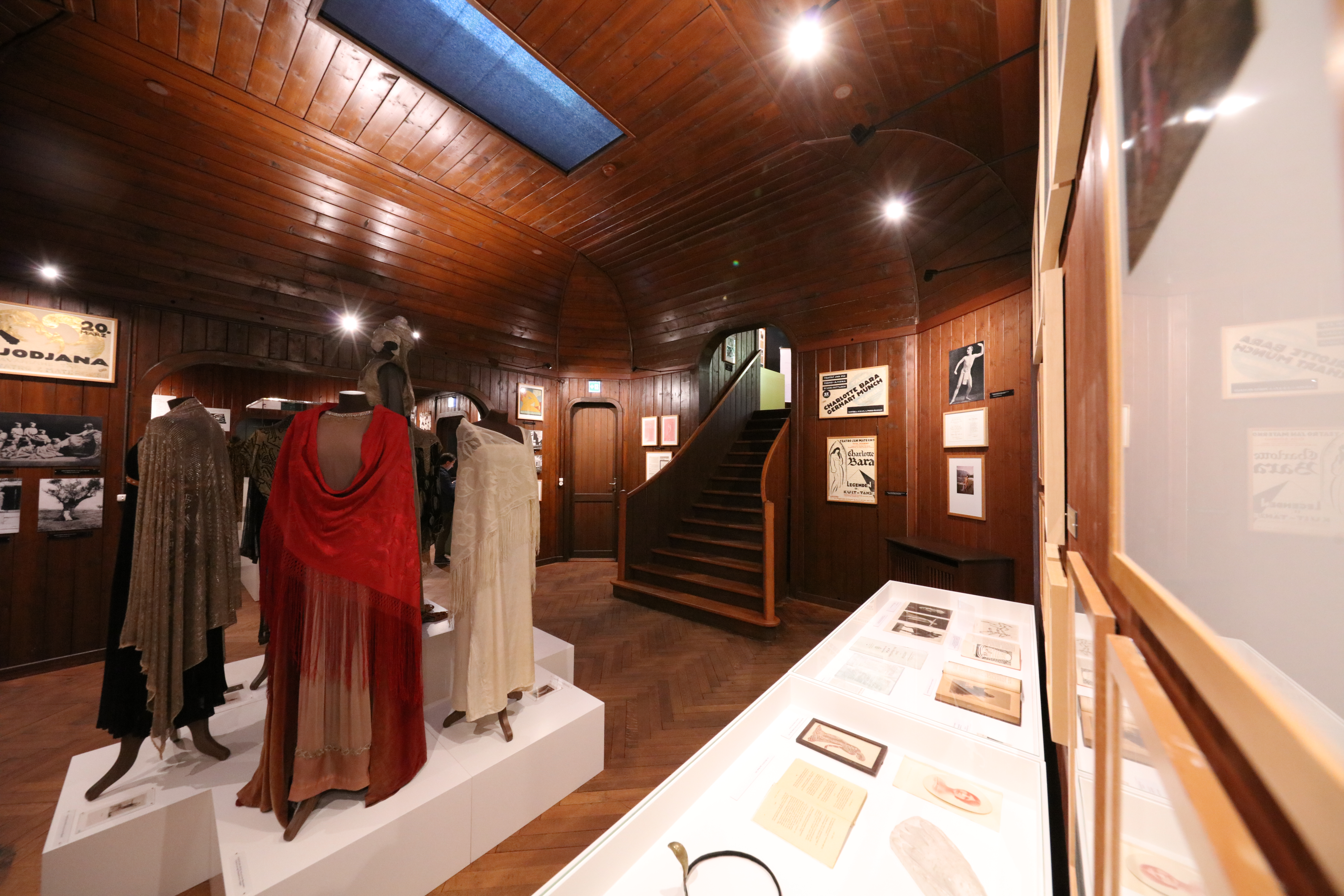 Innenaufnahmen aus der Casa Anatta.